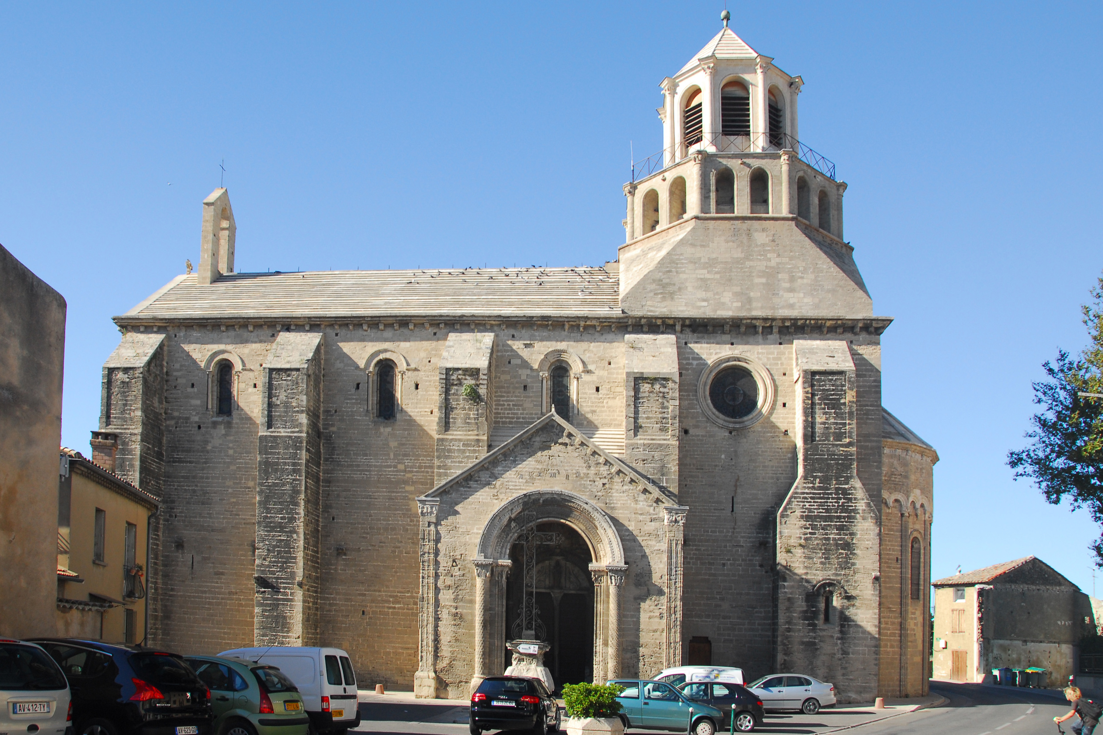 N-D-du-Lac du Le Thor, Südseite